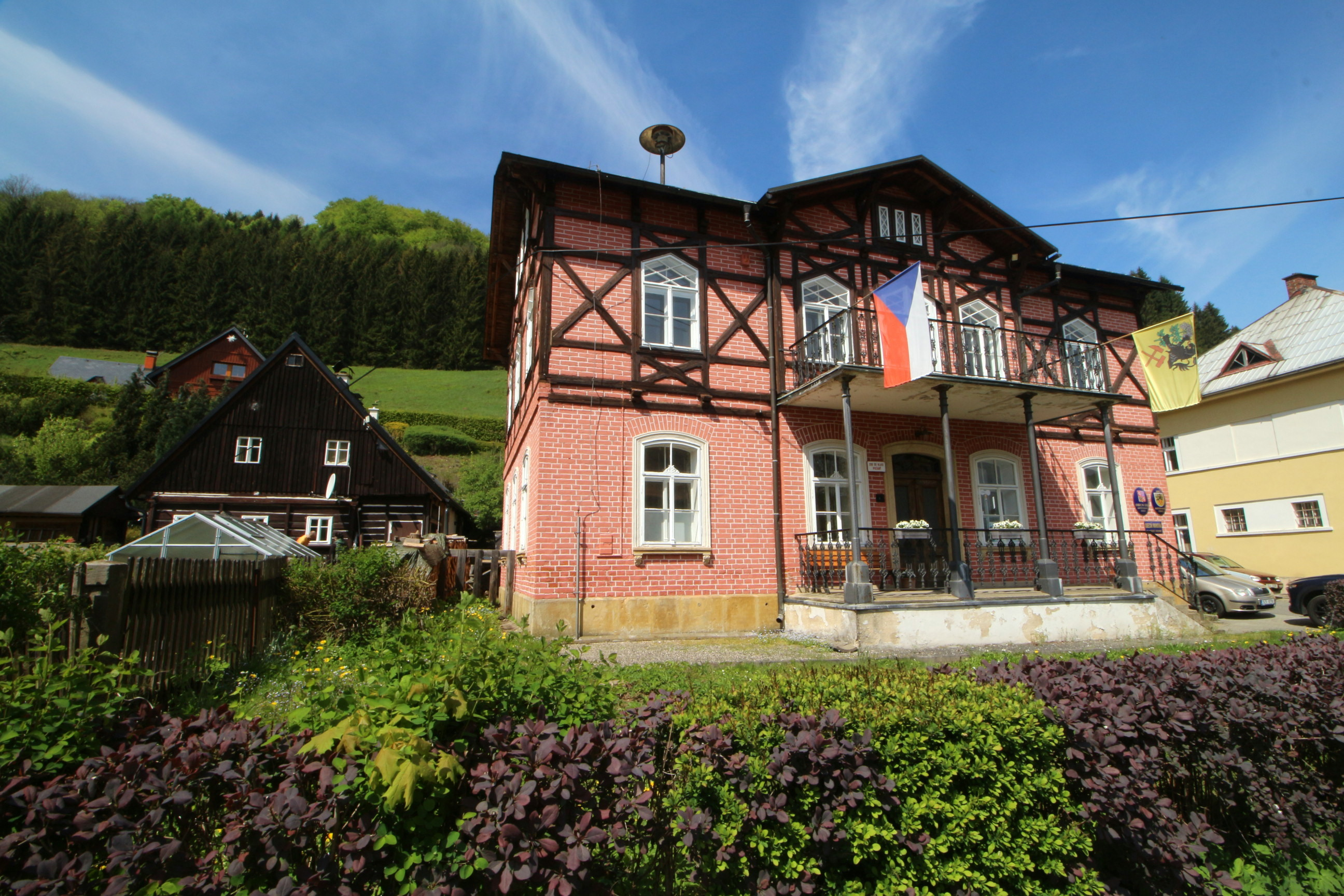 Kryštofovo Údolí OÚ